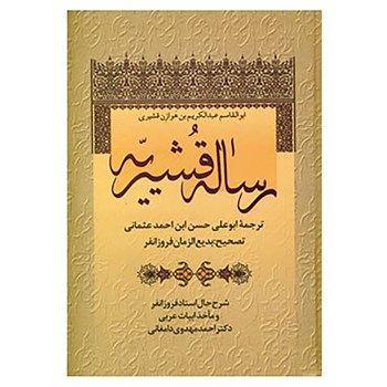 رساله قشریه مشهورترین اثر قشیری و از منابع مهم صوفیه به شمار می رود